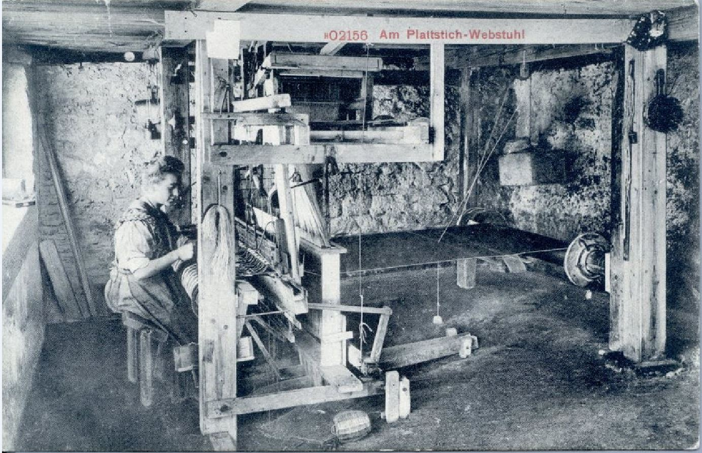 Die Postkarte von 1910 zeigt eine Frau an einem Plattstich-Webstuhl in einem Webkeller in Appenzell Ausserrhoden, Schweiz